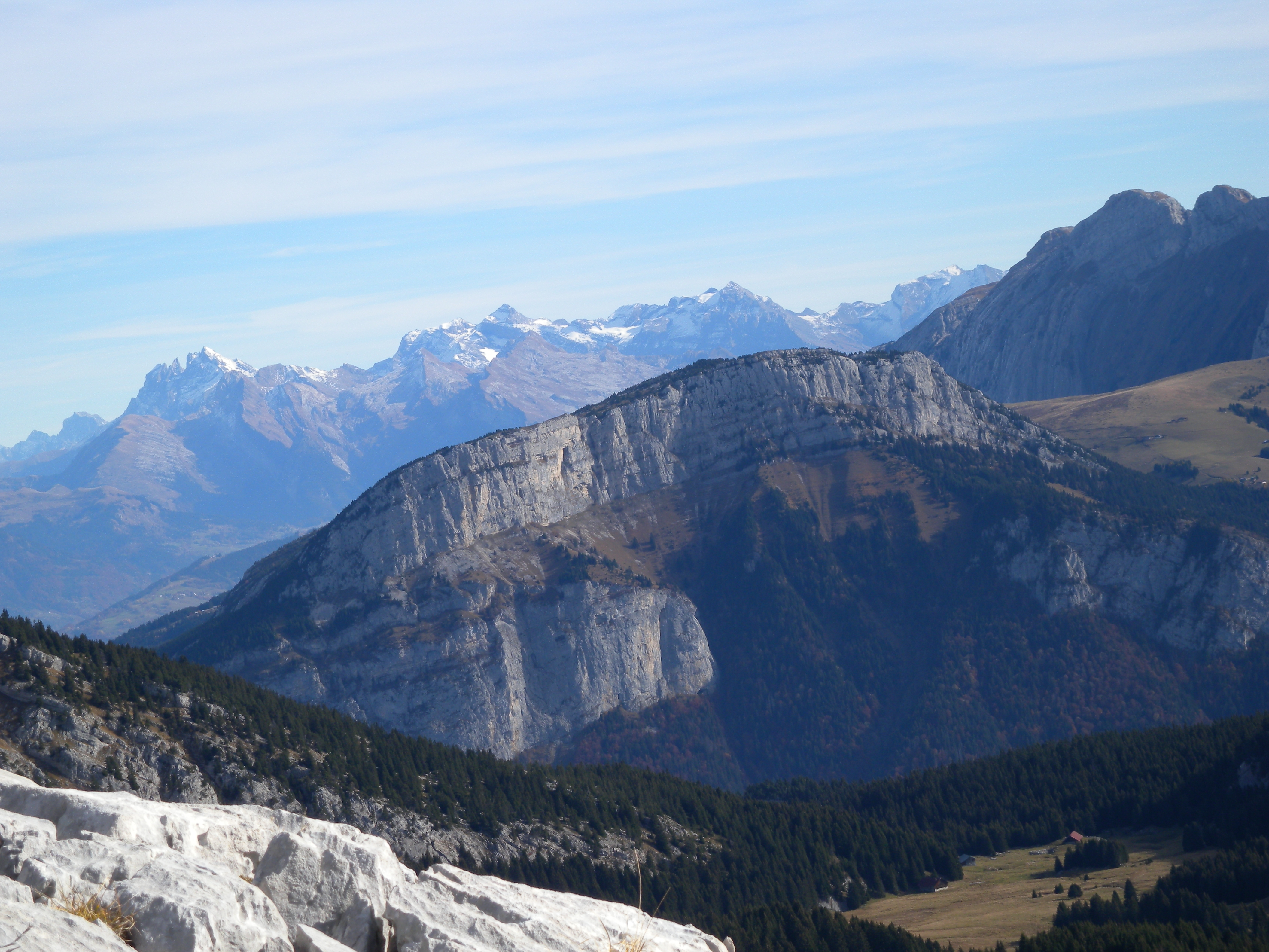 Rocher de Leschaux